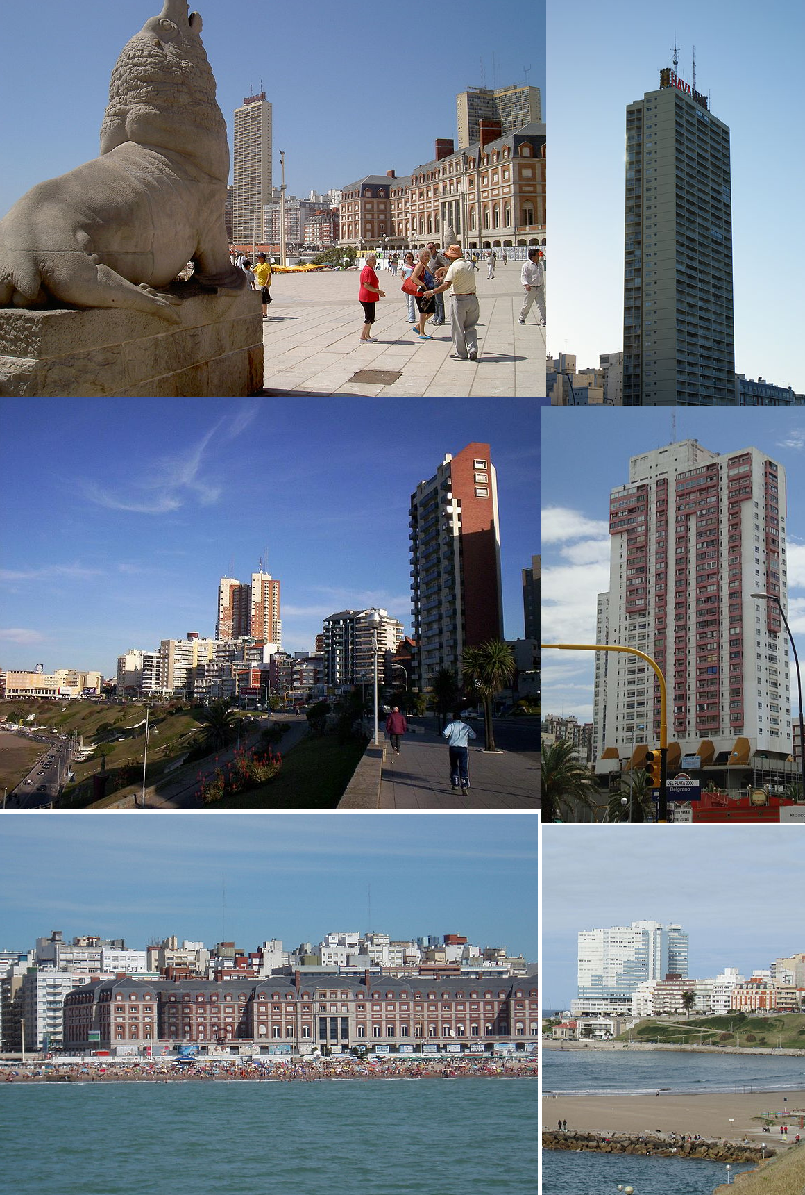 Collague of Mar del Plata, Argentina